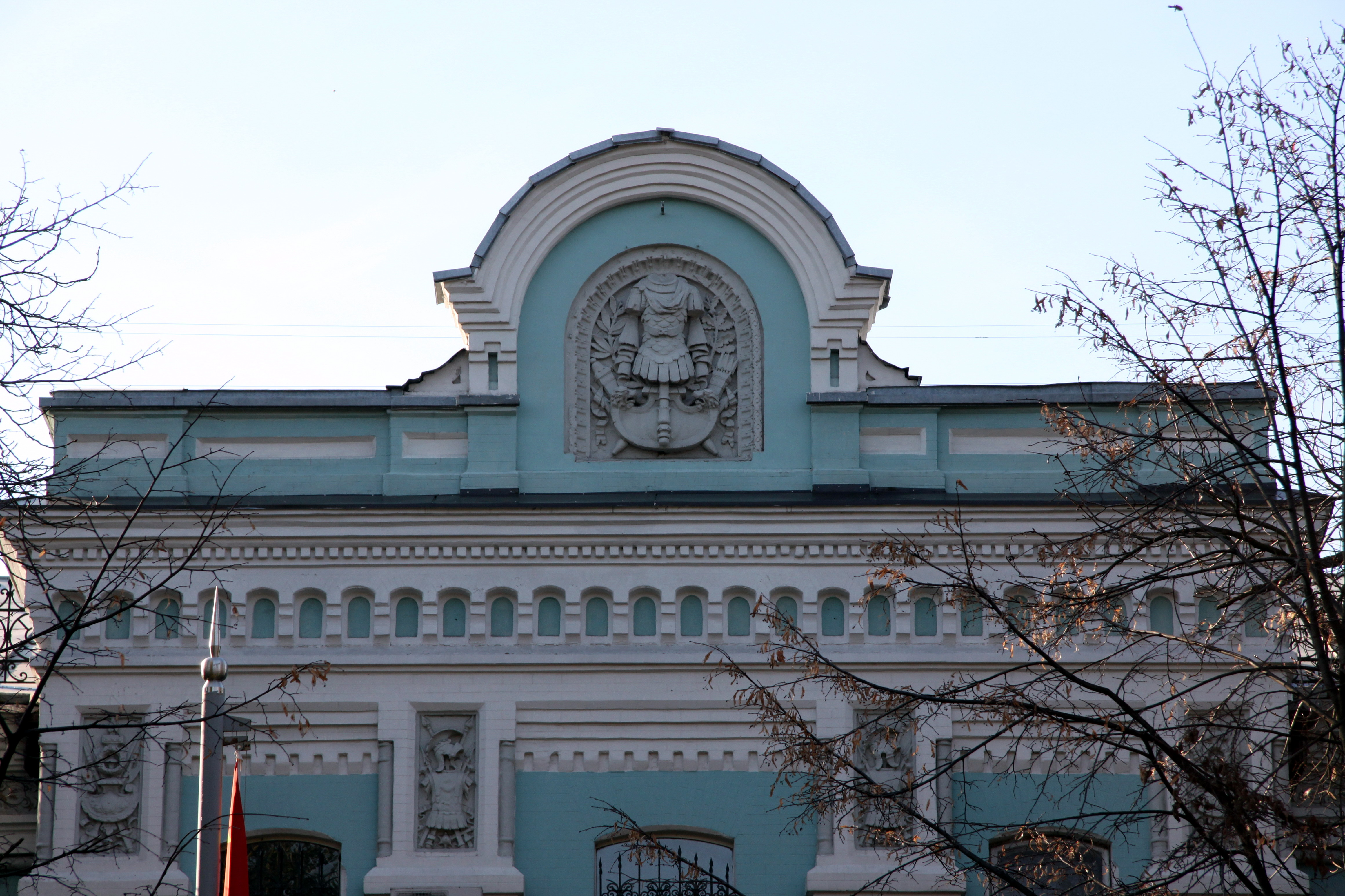 Будинок командувача військ Київського військового округу, де жили: у 1889–1903 роках — Драгомиров М. І., генерал-губернатор, українофіл, член Державної ради; радянські діячі: у 1935–1937 роках — Й. Е. Якір, у 1937–1938 роках —, Грушевського Михайла вул., 32, Київ